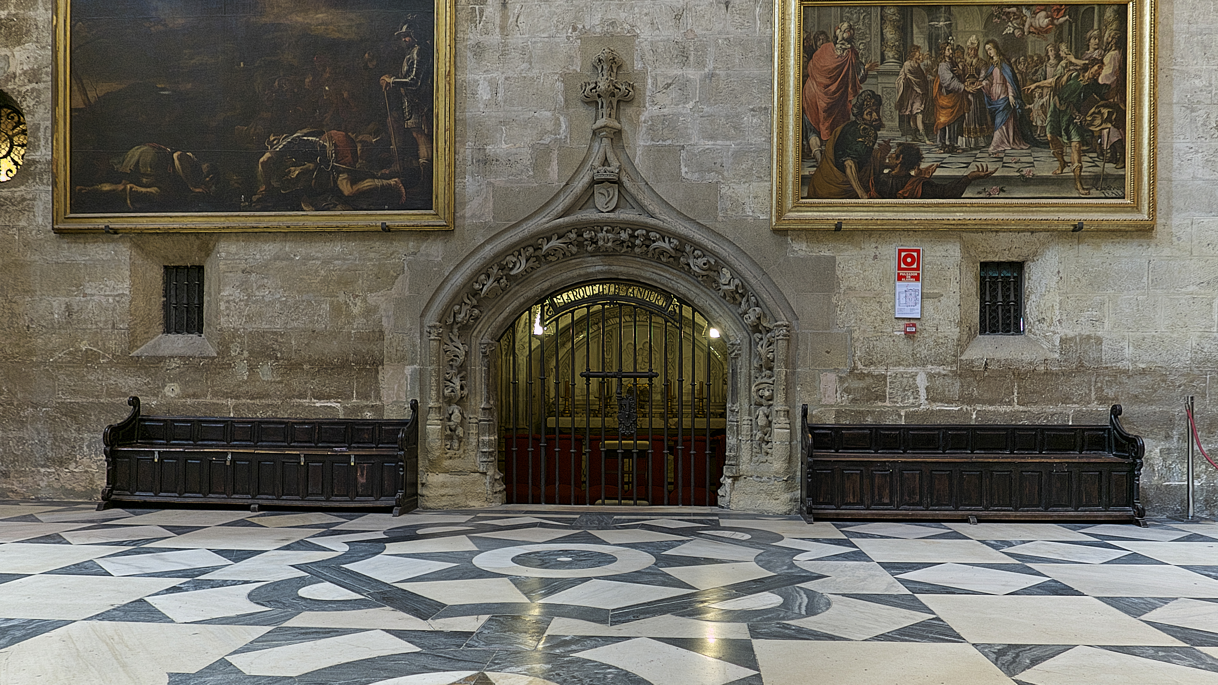 Trasaltar de la capilla mayor de la Catedral de Sevilla.